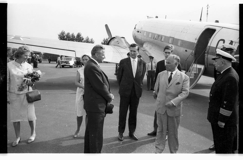 am Flughafen Holtenau. Bundestagspräsident Eugen Gerstenmaier (2.v.r.) werden von Oberbürgermeister Günther Bantzer (4.v.r.) und Stadtpräsident Hermann Köster (5.v.r.) begrüßt.